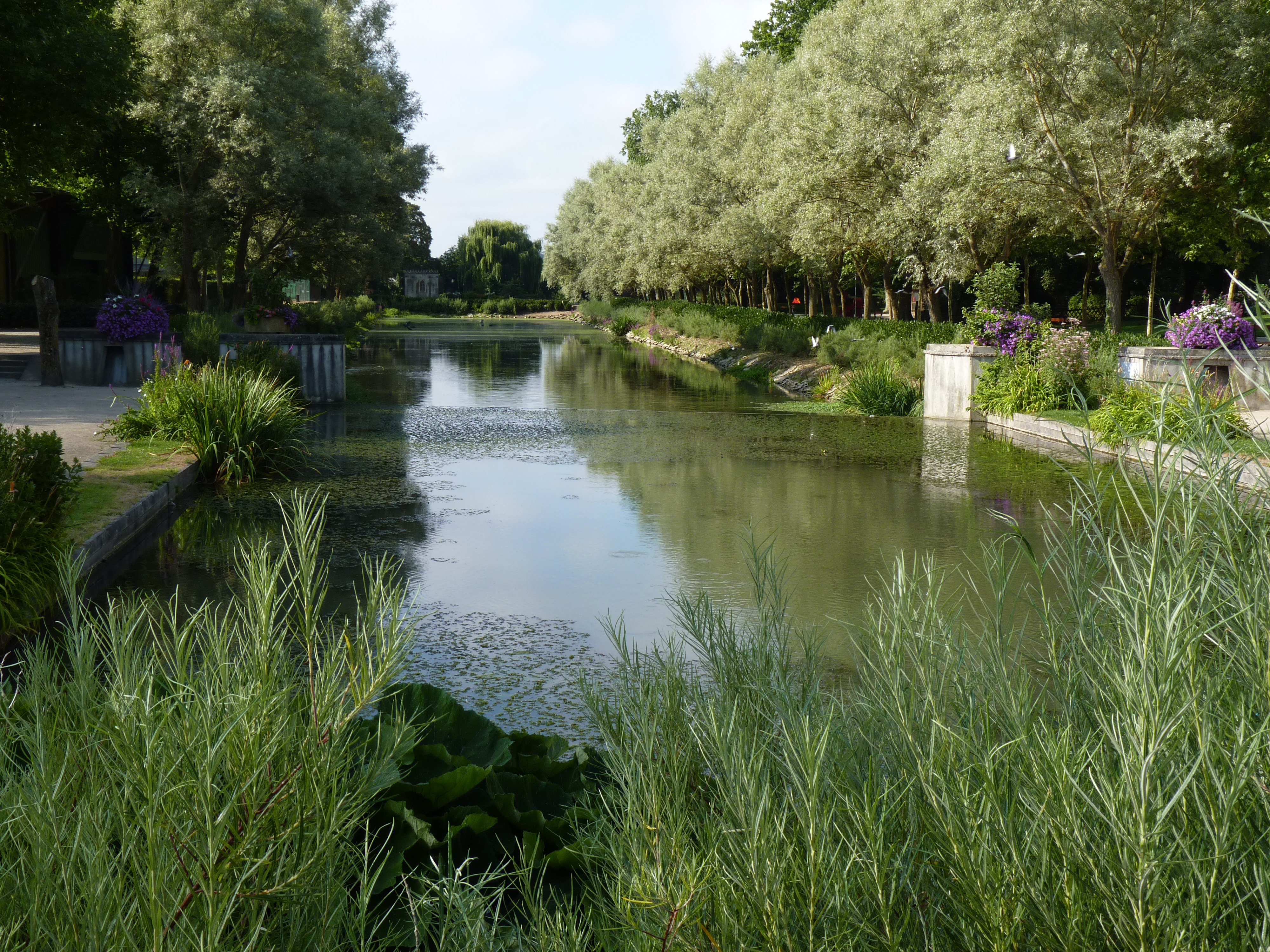 Sarthe - La Flèche - Parc des Carmes